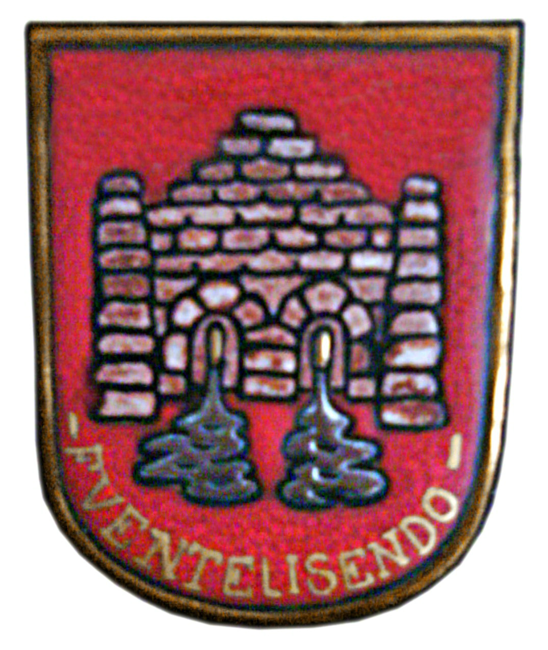 Escudo de Fuentelisendo conforme a la heráldica burgalesa. Descripción: Fuente de dos arcos de medio punto y en cada uno de ellos un caño de agua manando. Técnica: Cerámica y edición de la imagen digitalizada.